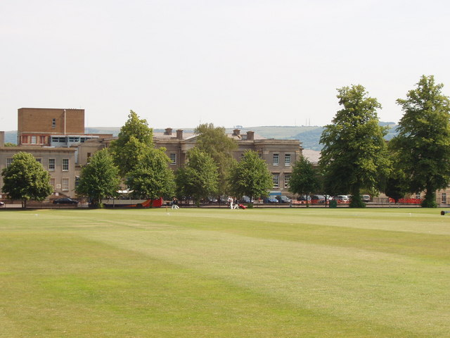 Cheltenham General Hospital